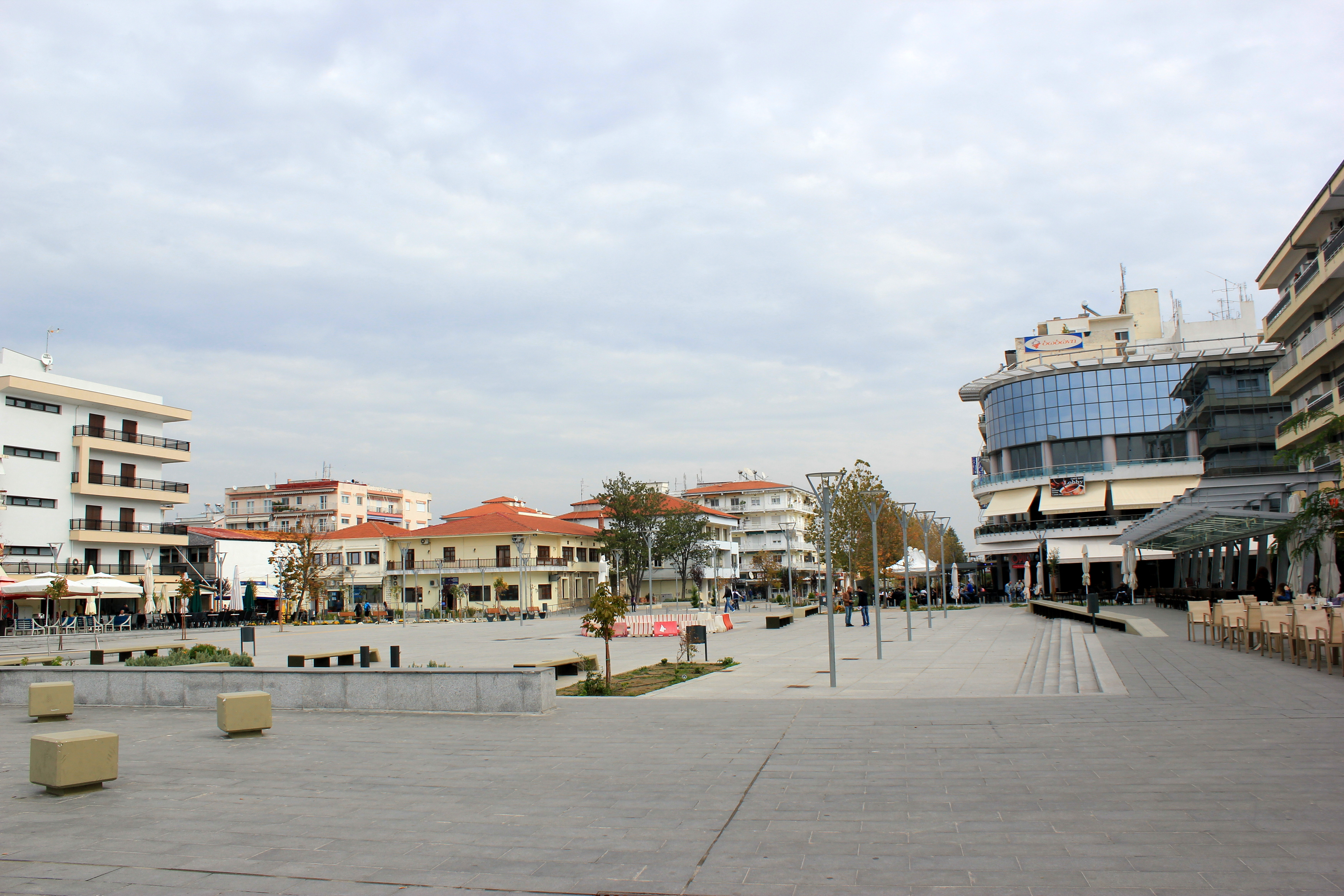 Im Stadtzentrum von Orestiada, Griechenland.